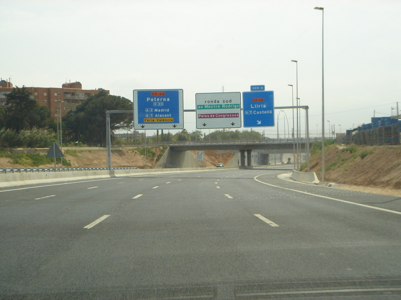 Unknown imagen de la ronda norte de Valencia CV-30